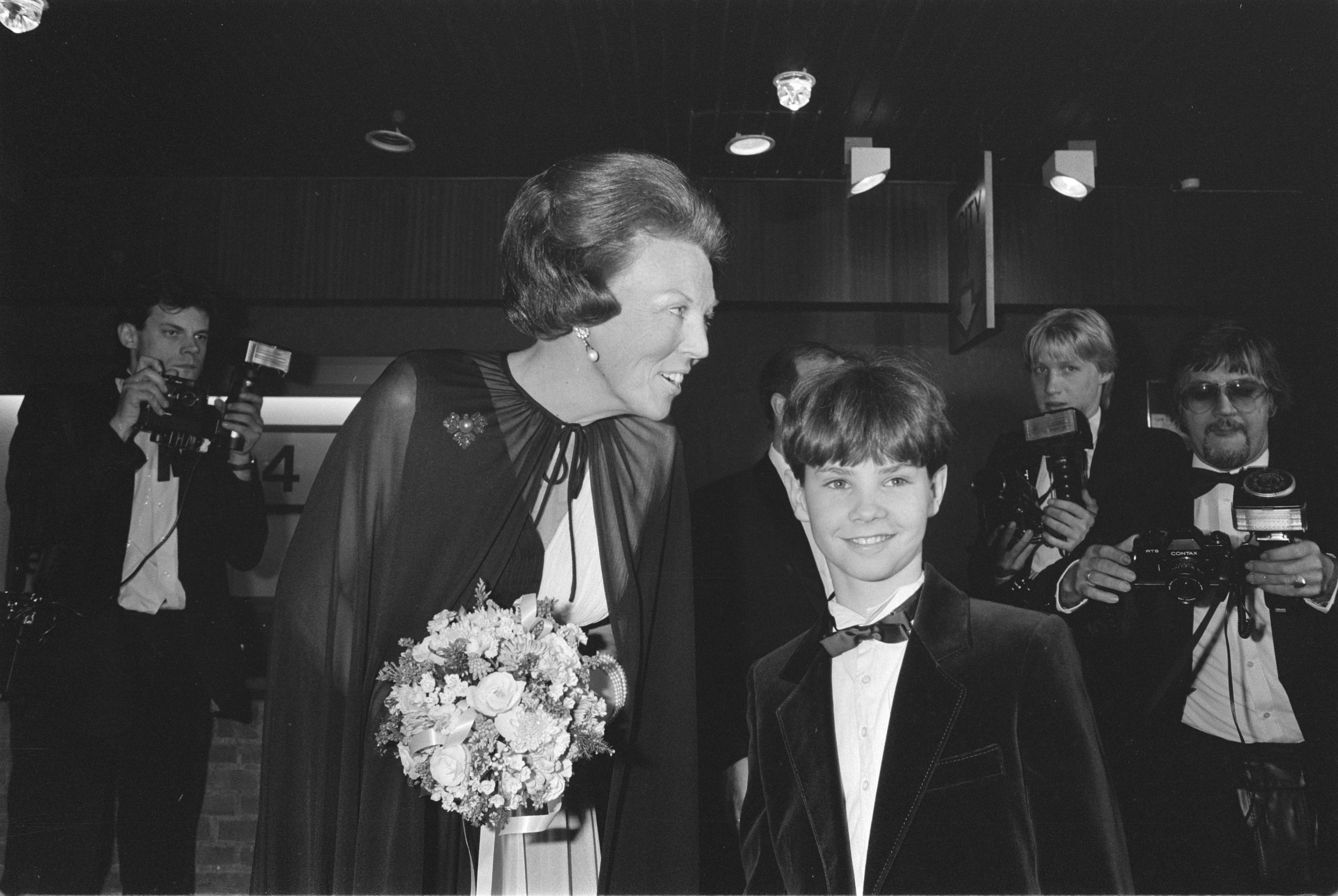 Collectie / Archief : Fotocollectie Anefo Reportage / Serie : Koningin Beatrix en Prins Claus bij de première van de film Ciske de Rat Beschrijving : Koningin Beatrix kreeg bloemen van hoofdrolspeler Danny de Munk (Ciske) Datum : 27 maart 1984 Trefwoorden : BLOEMEN, PREMIERES, films, koninginnen Persoonsnaam : Beatrix, koningin, Ciske, Claus, prins, Munk, Danny de Fotograaf : Croes, Rob C. / Anefo Auteursrechthebbende : Nationaal Archief Materiaalsoort : Negatief (zwart/wit) Nummer archiefinventaris : bekijk toegang 2.24.01.05 Bestanddeelnummer : 932-9143